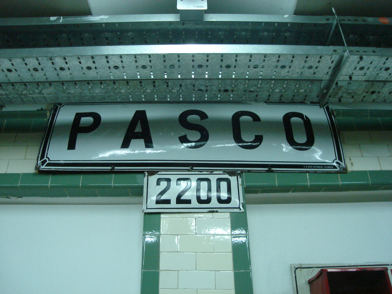 Señalética primigenia de la estación Pasco de la línea A del Subte de Buenos Aires.